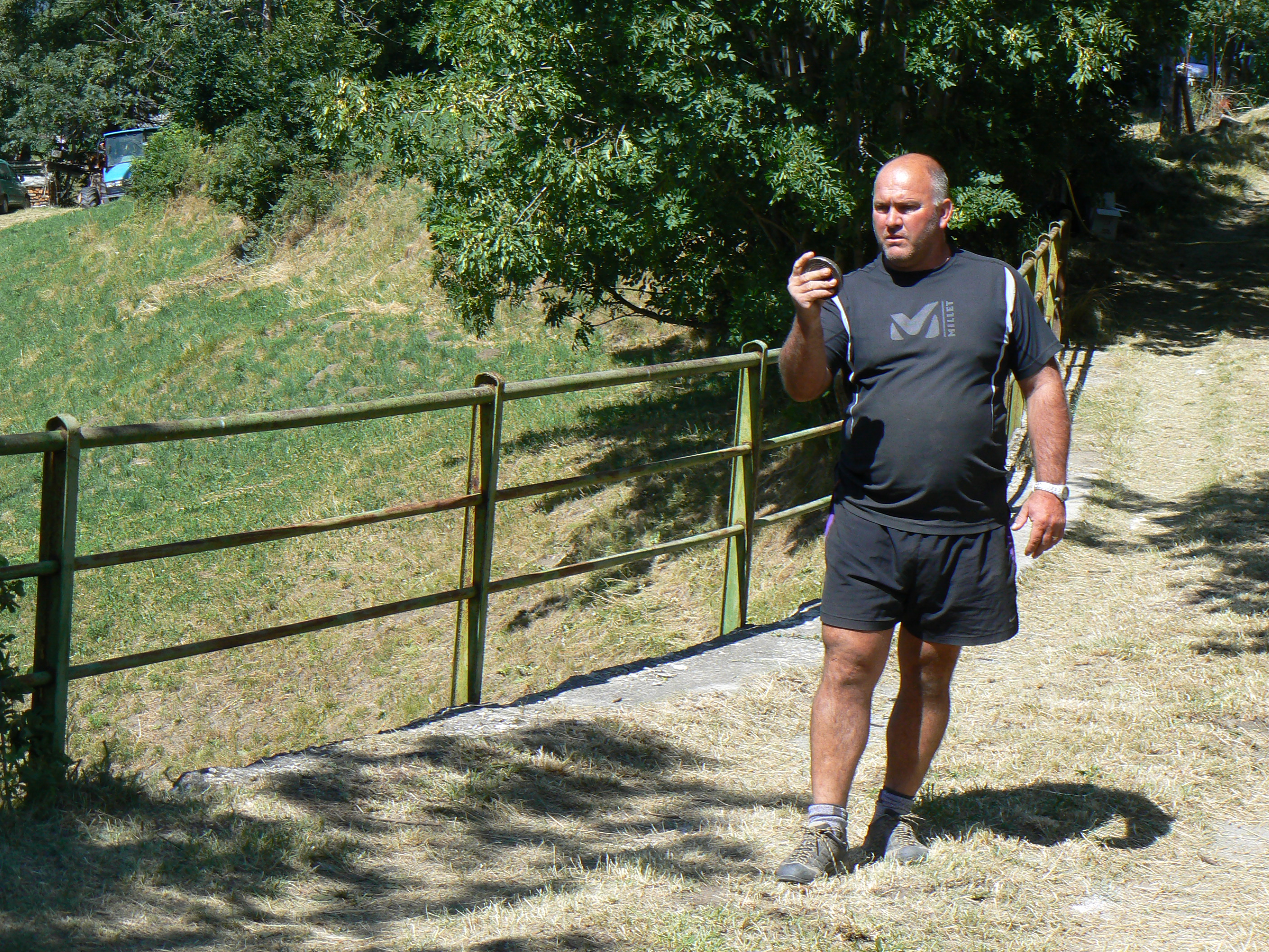 Un giocatore si prepara al lancio. Partita di palet valdostano "a baraonda" durante la Festa della Favò 2012 nella frazione di Ozein, Aymavilles, Valle d'Aosta, Italia.